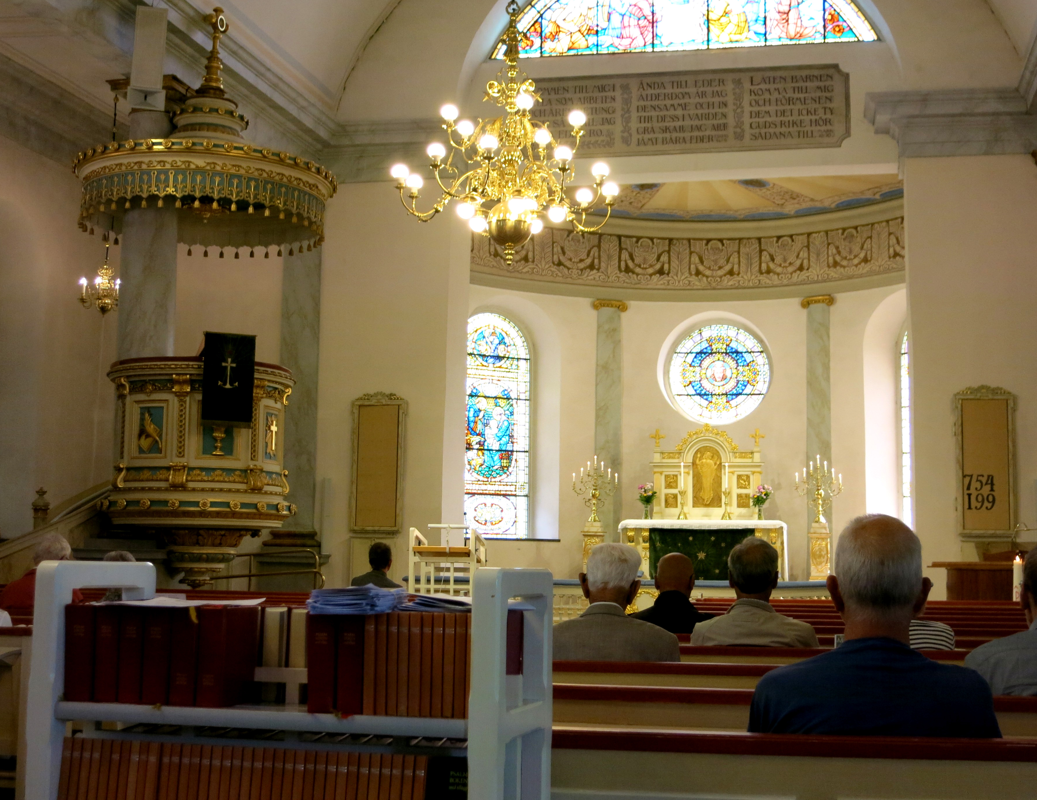 Carl Johans kyrka, Göteborg. Kyrkorummet mot koret